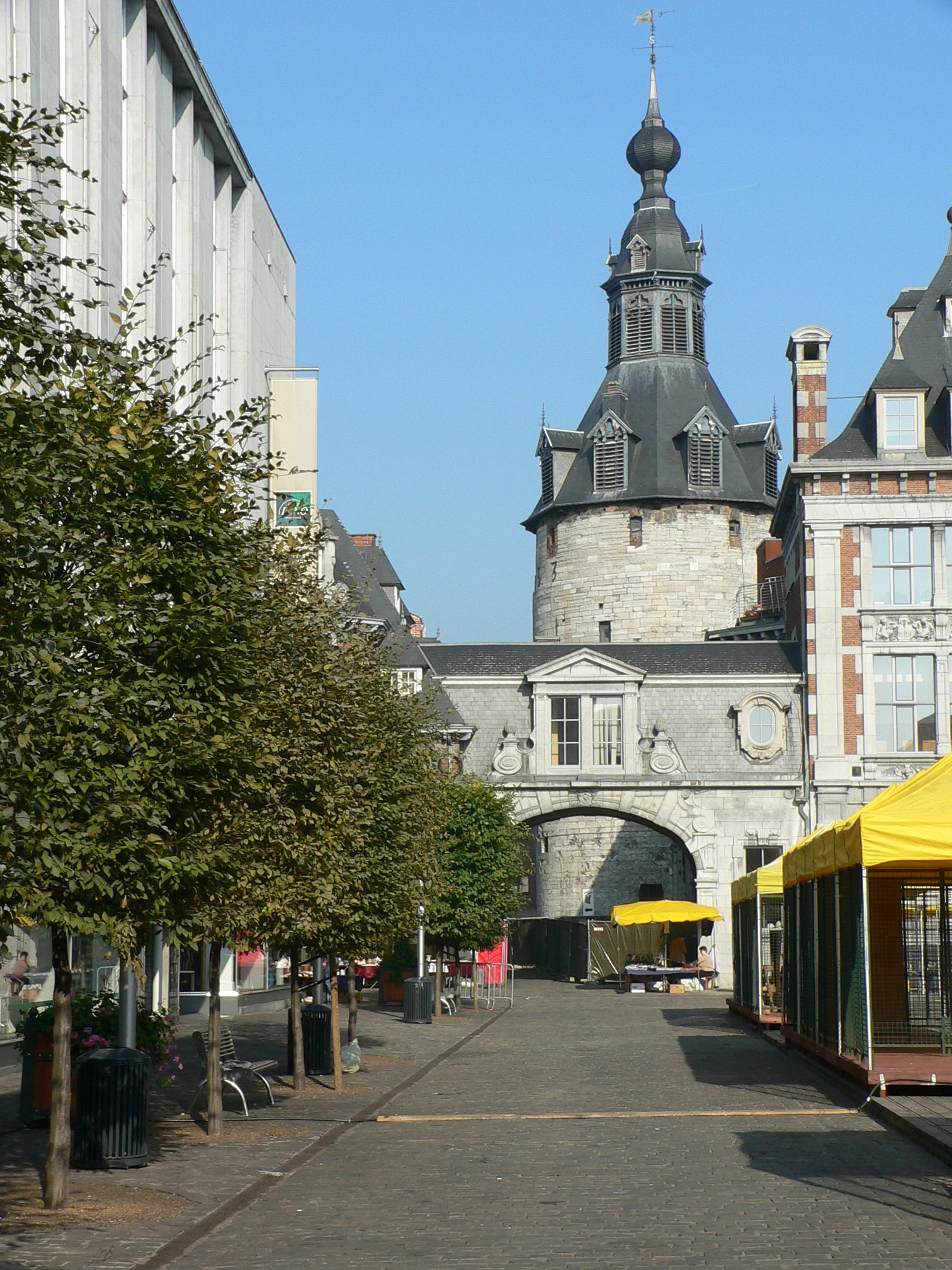 Foto de Mario Scolas, autor de esta foto...Todos los derechos son libre